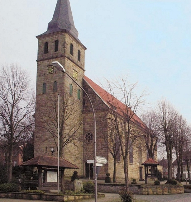 Der Kirchplatz in Riesenbeck mit der St.-Kalixtus-Kirche This image shows a heritage building in Germany, located in the North Rhine-Westphalian city Hörstel (no. A 042).